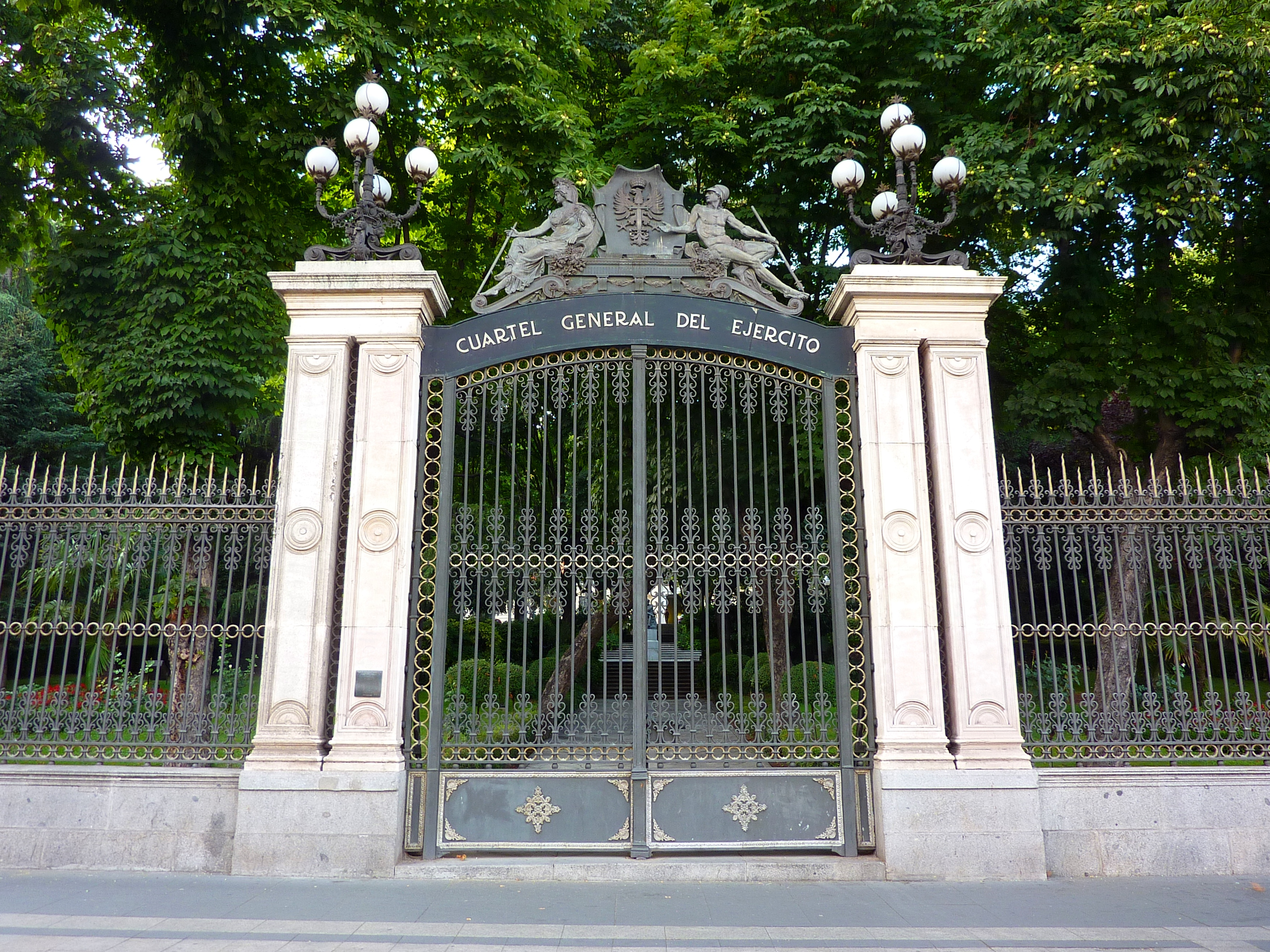 Portada del Cuartel General del Ejército Español, en Madrid.